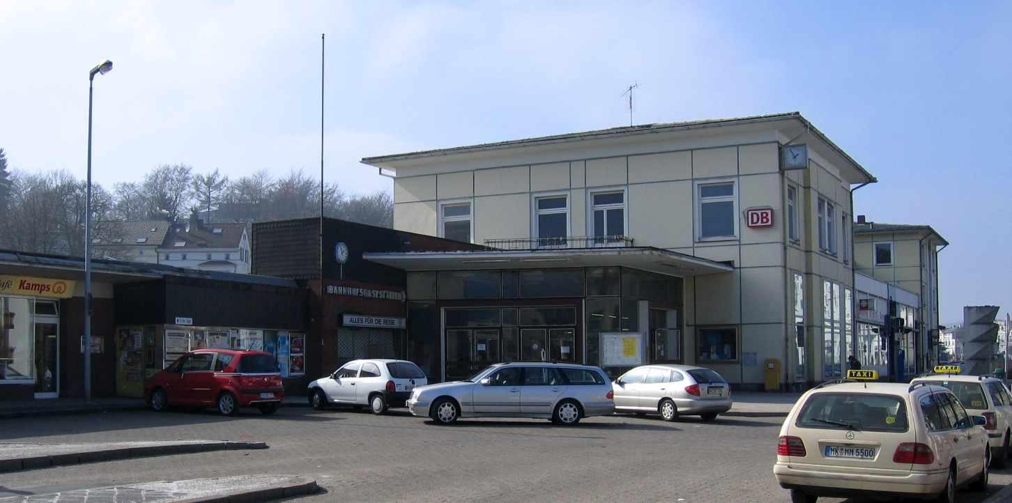 Description: Vorplatz des Bahnhofs Iserlohn ("Westbahnhof"). Source: selbst fotografiert Date: 19. März 2006 Author: Asio otus